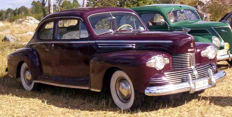 1942 Lincoln Coupe